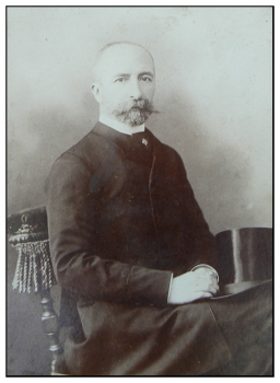 Георги Груев